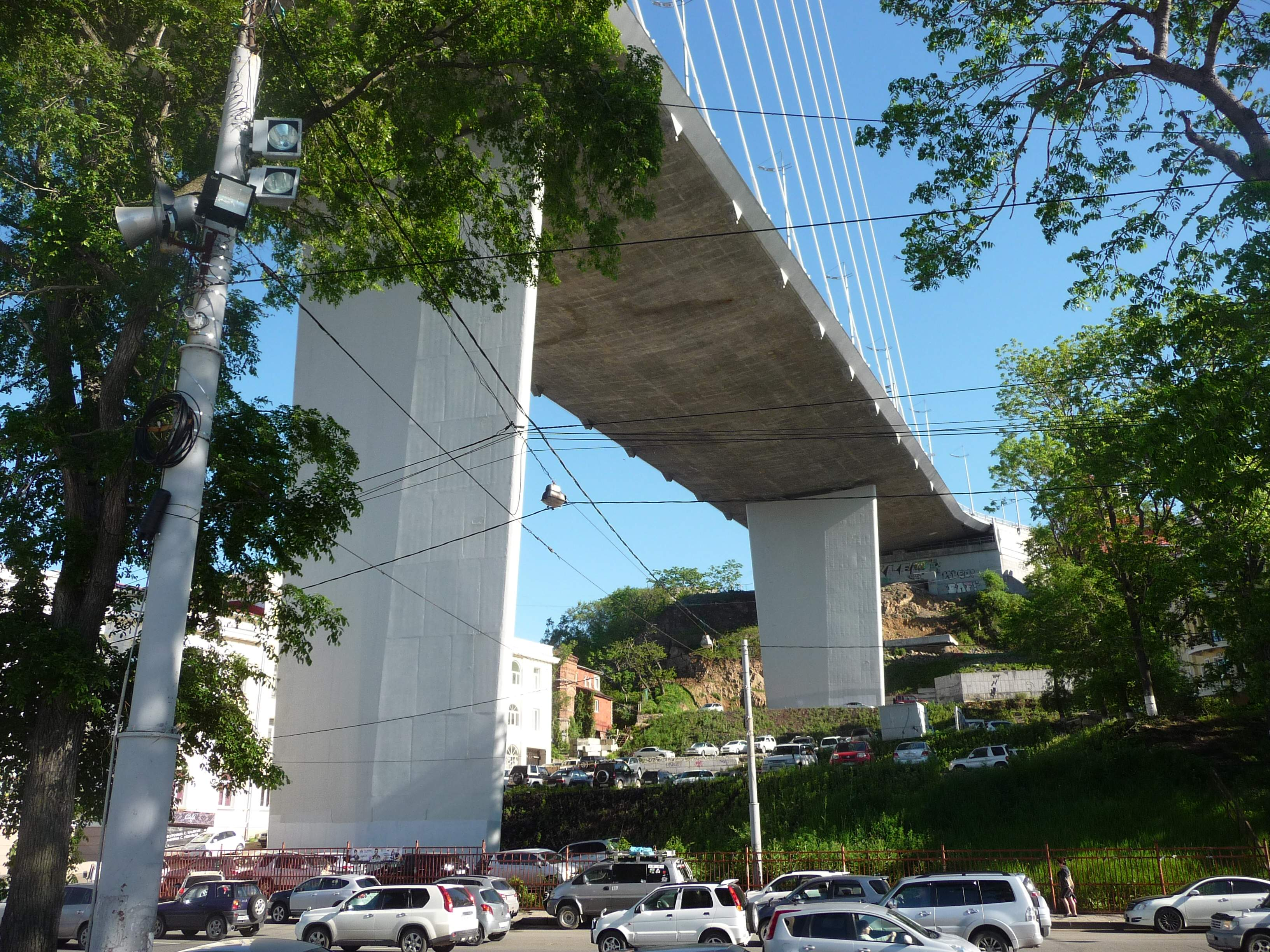 Золотой мост над улицей Сетланской, Владивосток, 2015-06-04